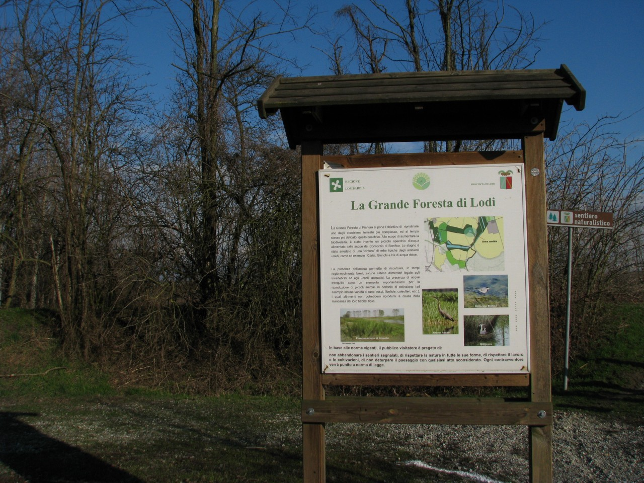 La grande foresta di Pianura di Lodi, il primo nucleo presso la cascina Costino è stato piantumato nel 2003